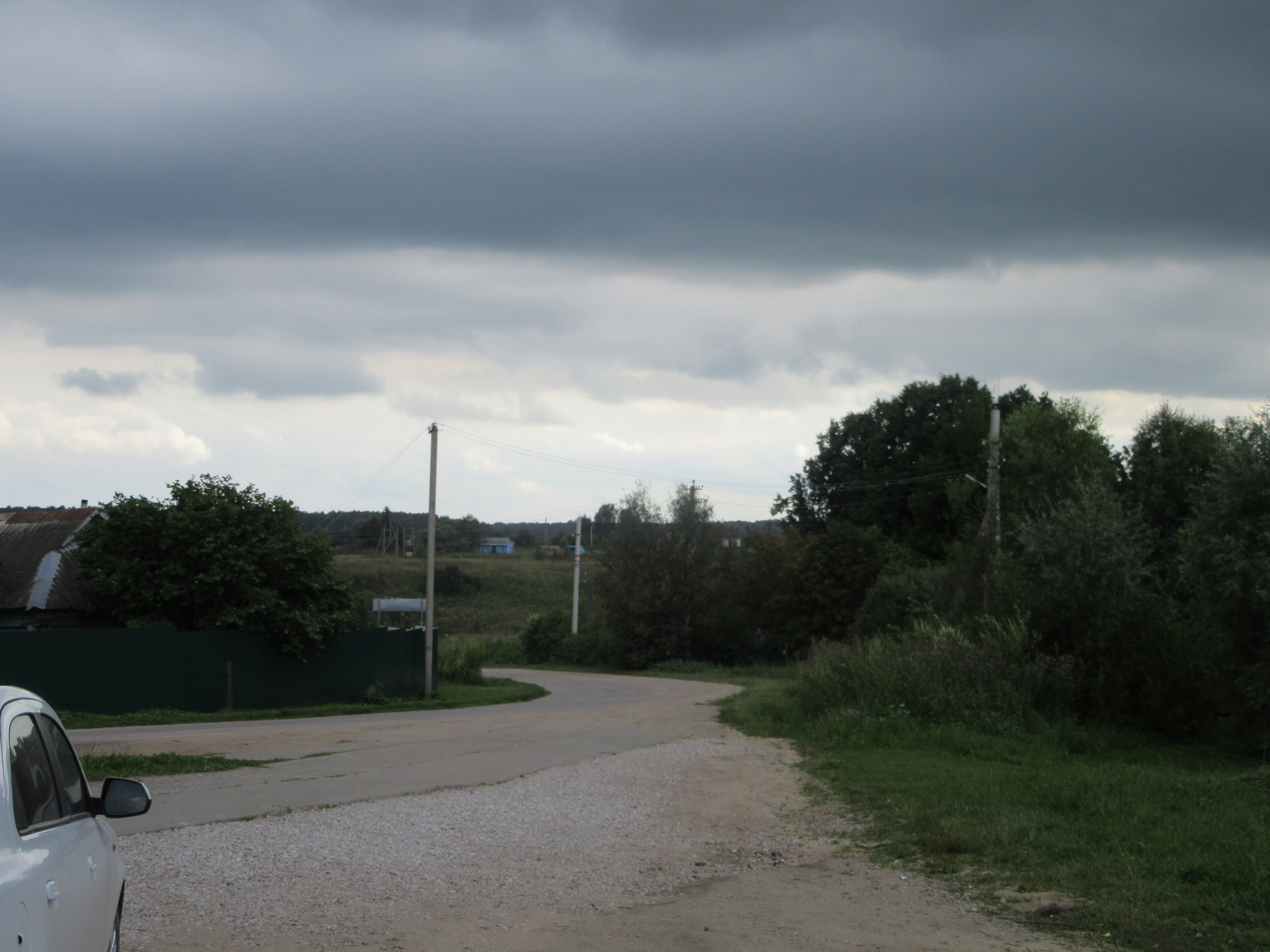 Шанский завод. Вид от сельской администрации